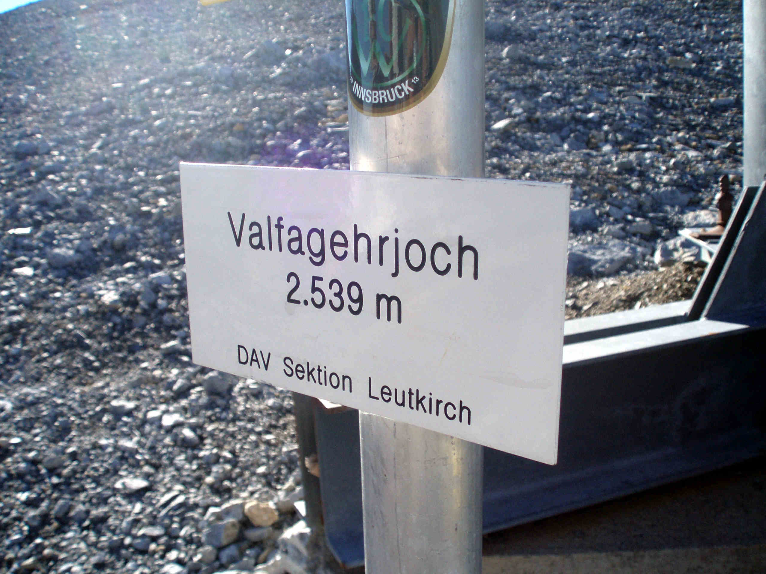 Am Valfagehrjoch